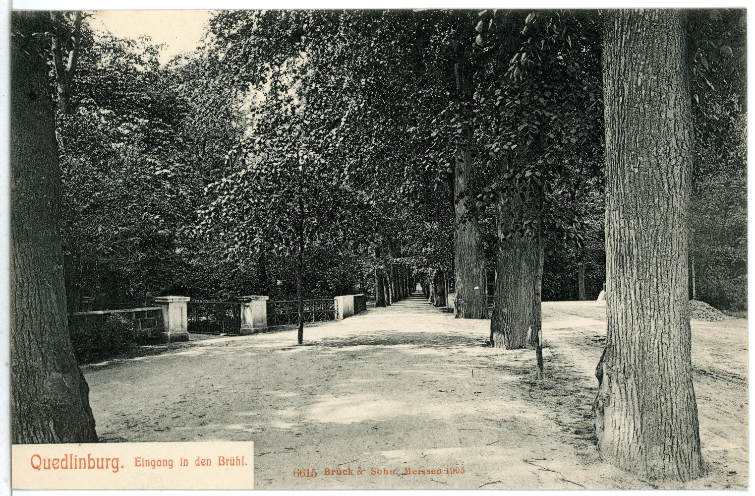 Quedlinburg; Eingang in den Brühl This postcard is from publisher Brück & Sohn in Meißen ( This postcard has a unique number 06615 and is available in a higher resolution at the publisher. This images was uploaded in a cooperation project between Wikipedians and the publisher.